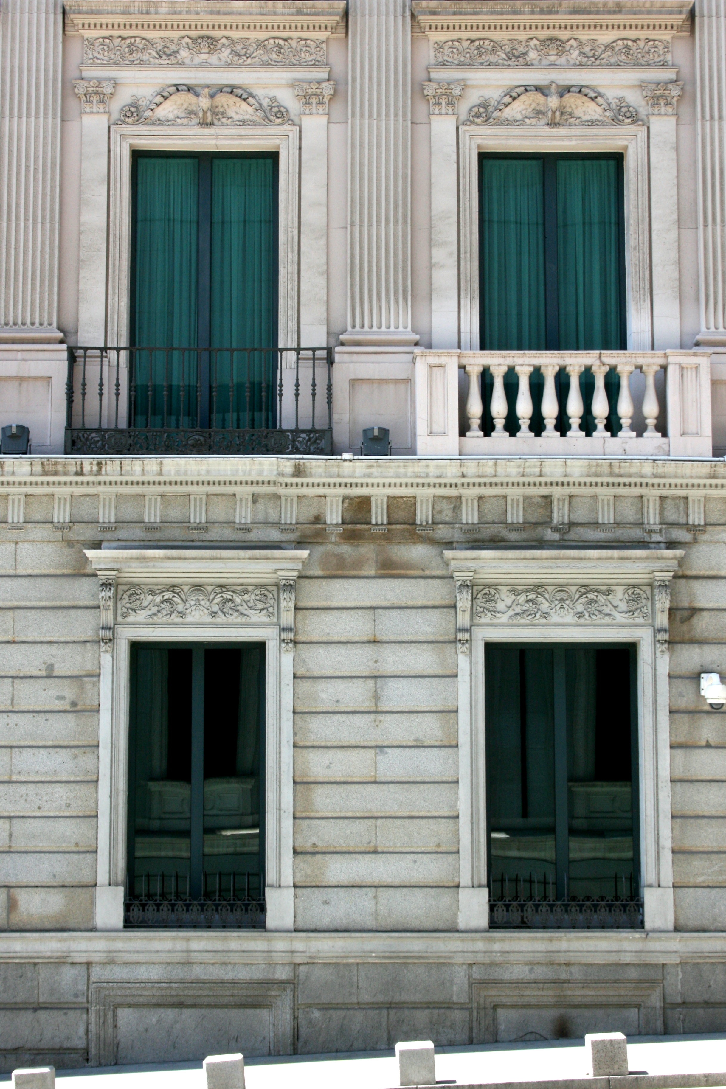 Casa-palacio de Francisco de las Rivas, Carrera de San Jerónimo, 40. Madrid. Arquitecto José Alejandro y Álvarez, proyecto firmado en 1846.